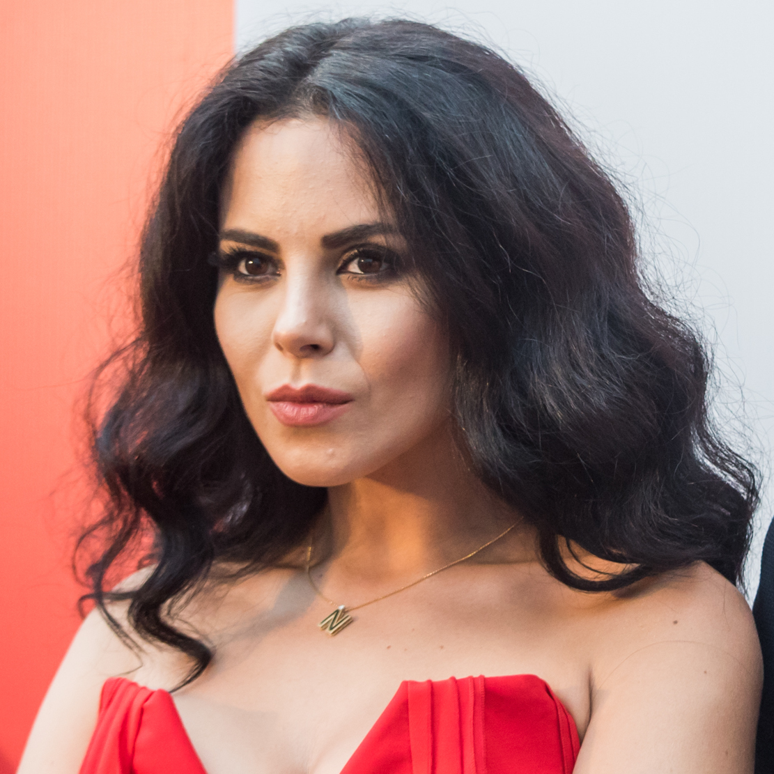 Потап и Настя на фестивале «Лайма. Рандеву. Юрмала 2017»